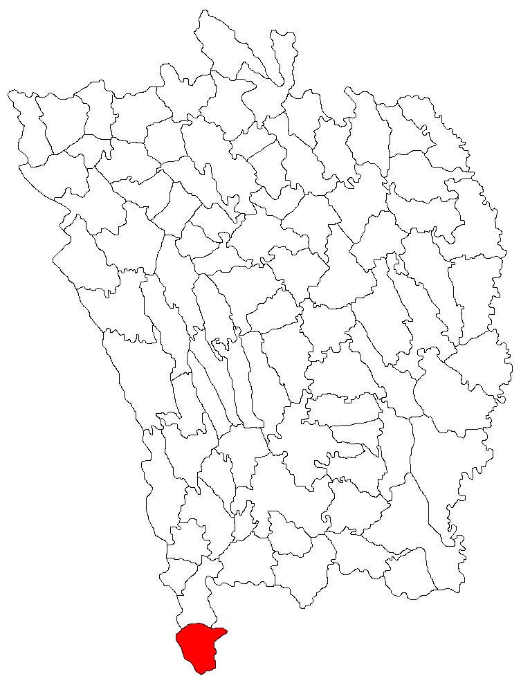 Categorie:Hărţi ale judeţului Vaslui